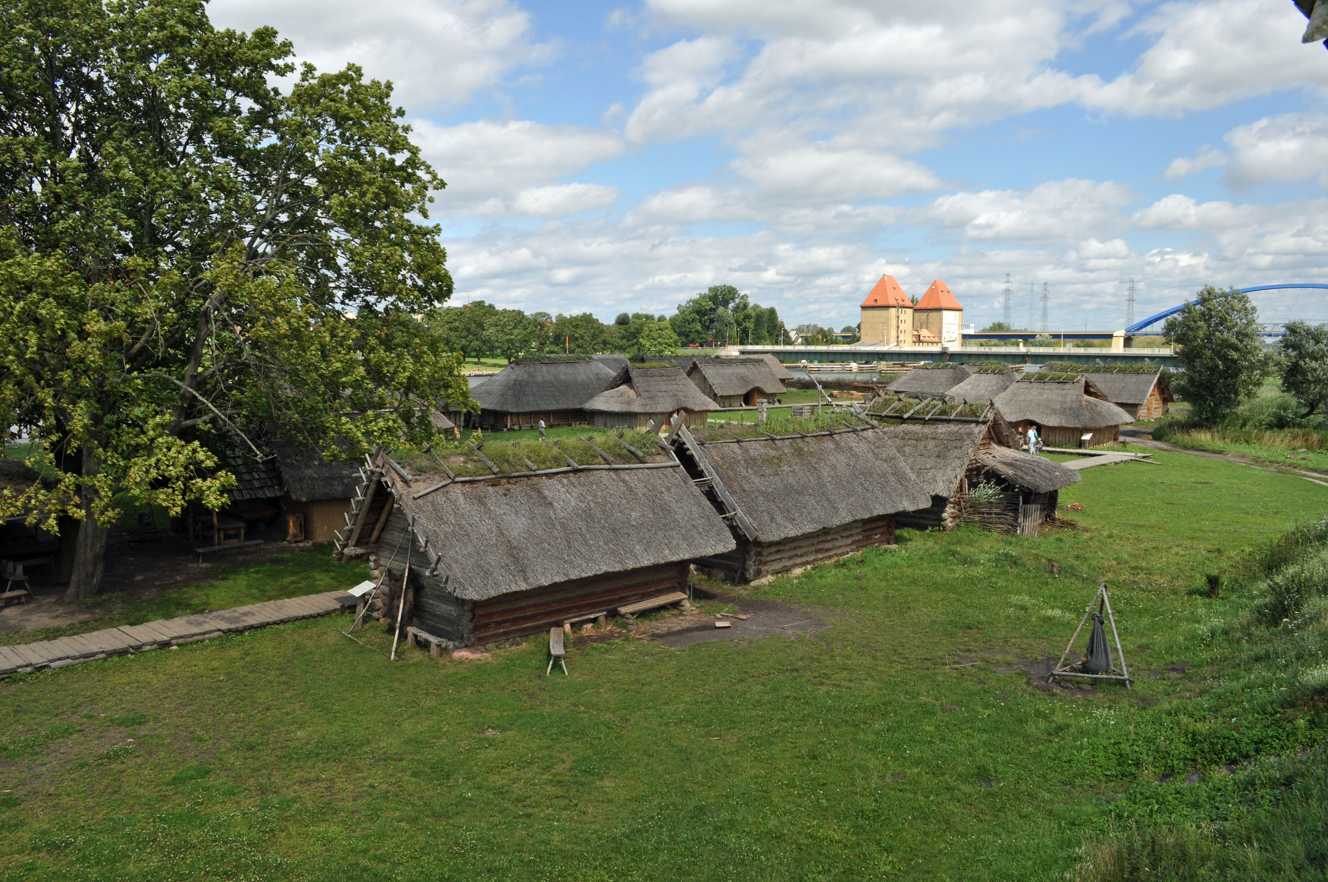 In Wolin (Polen). Aufgenommen am 24. Juli 2011.